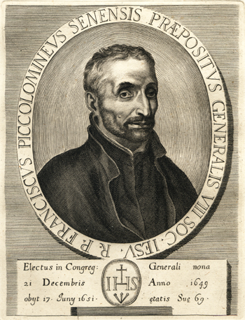 Franziskus Piccolomini, Jesuitengeneral